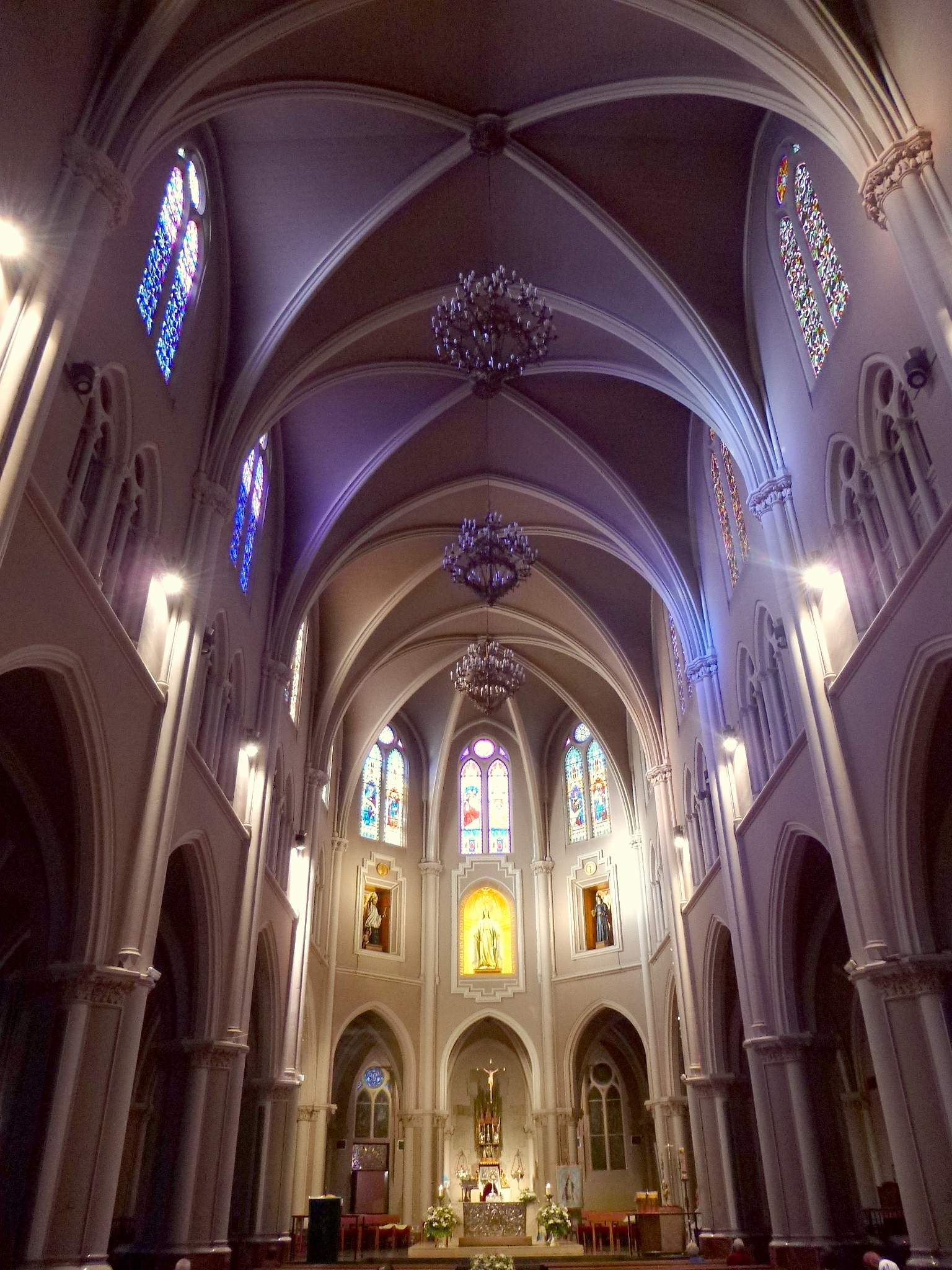 Basílica de la Virgen Milagrosa, de PP Paúles, en Madrid